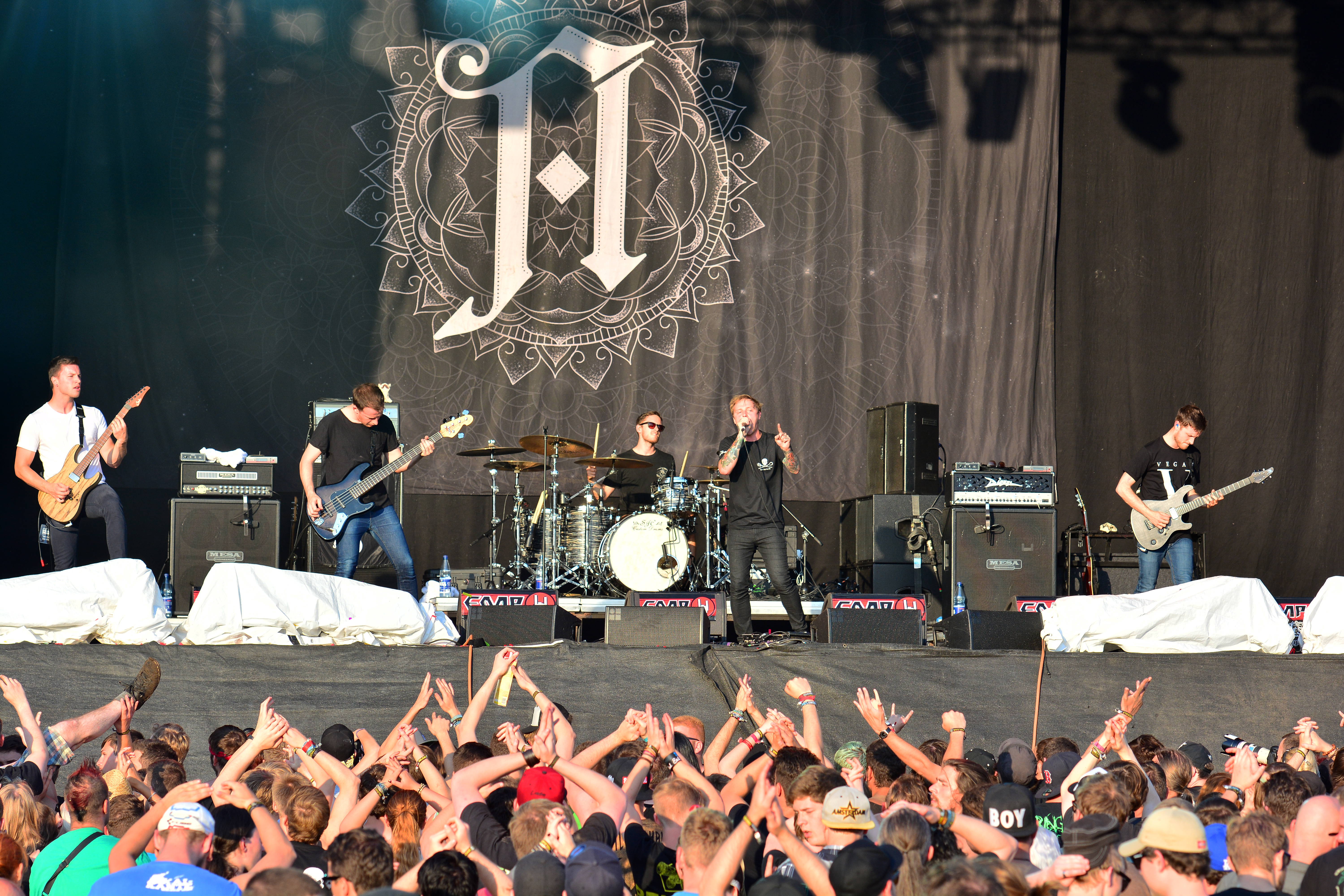 Architects beim Reload Festival 2015